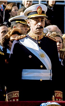 Teniente General Jorge Videla en 1978..